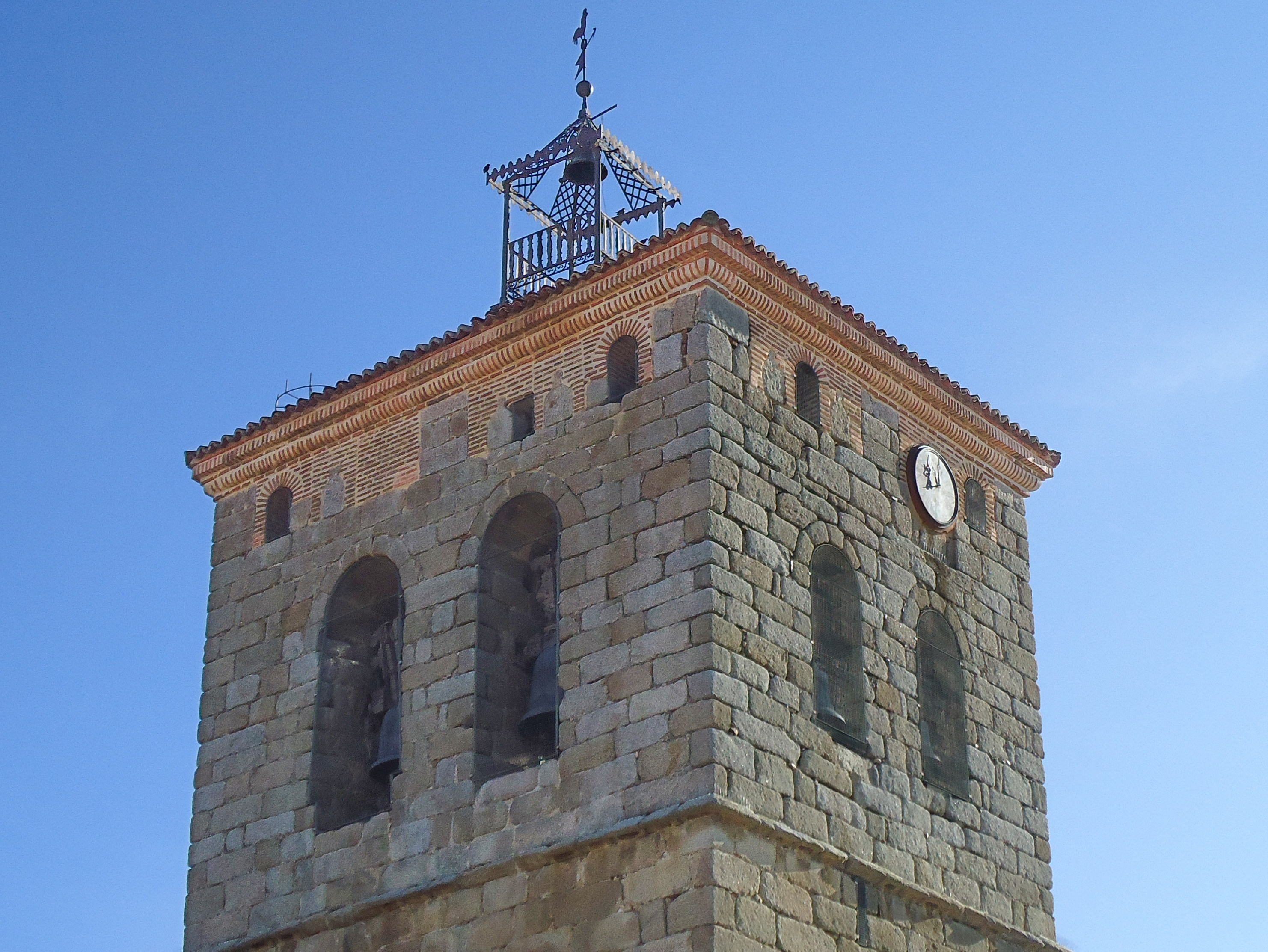 Detalle de la Torre de la Iglesia de Nuestra Señora del Castillo, en Macotera. Cuerpo de campanas (se ven las cuatro campanas mayores de la Iglesia). También se observa el reloj, hoy en desuso y las almenas cegadas hoy con ladrillo. En lo alto la veleta y la campana del antiguo reloj.